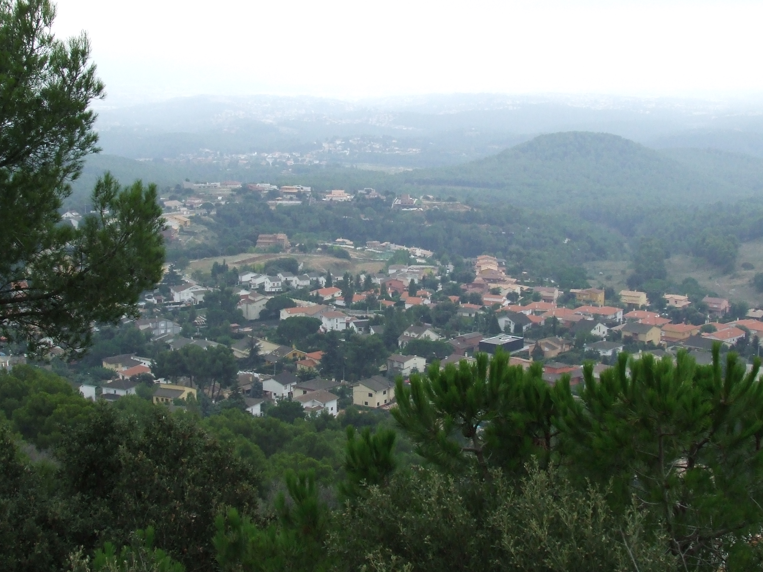 Urbanització de Can Regassol (Bigues, Bigues i Riells, Vallès Oriental)